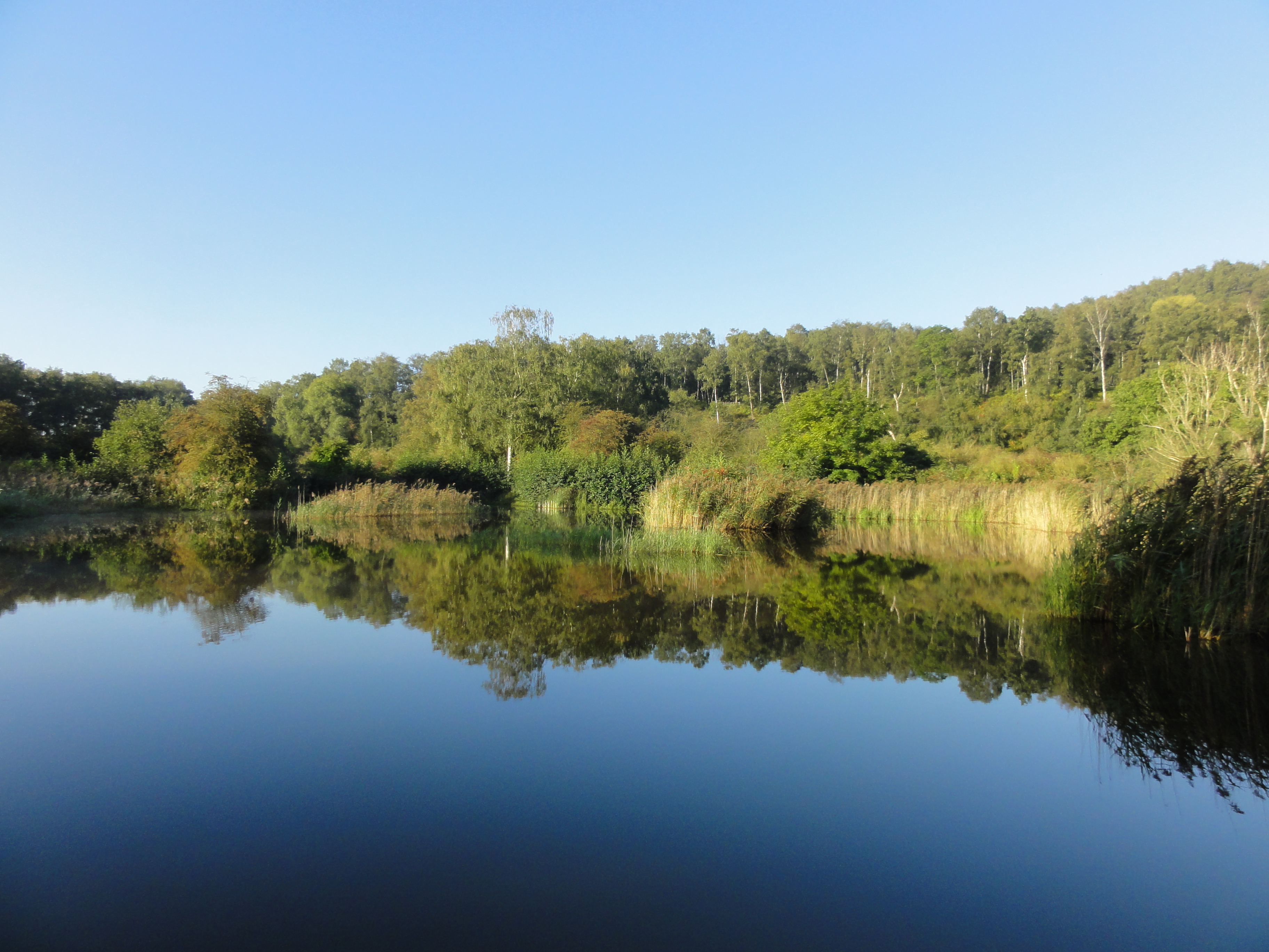 Terrils nos 123 et 141 respectivement dénommés Escarpelle ancien plat et 1 Nouveau Est, Fosse n° 1 de la Compagnie des mines de l'Escarpelle, Roost-Warendin, Nord, Nord-Pas-de-Calais, France. Le terril conique n° 141 a été créé par dessus le terril plat n° 123, à ce titre, ils sont indissociables.